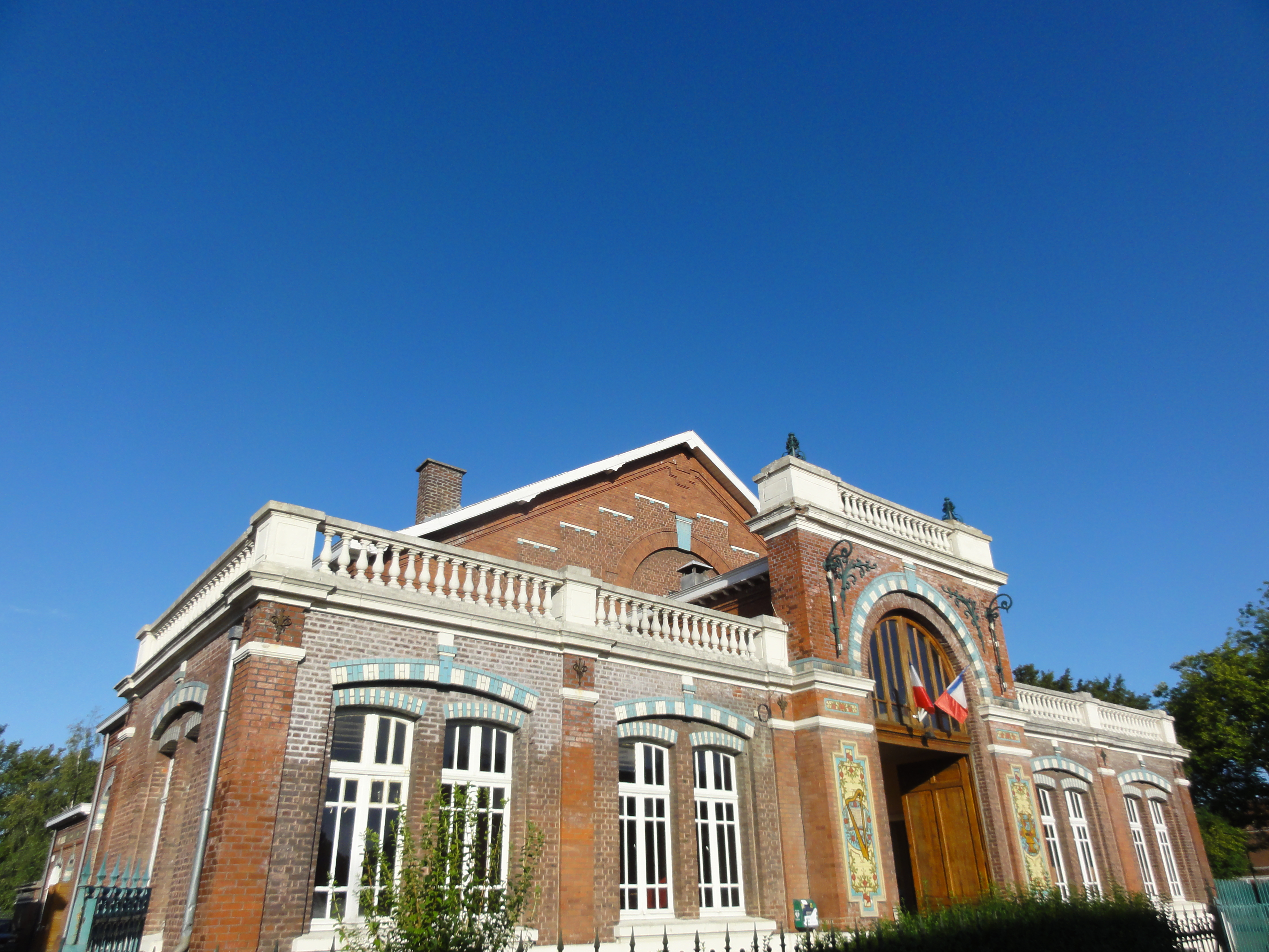 Salle des fêtes des cités de la fosse Arenberg de la Compagnie des mines d'Anzin dans le bassin minier du Nord-Pas-de-Calais, Wallers, Nord, Nord-Pas-de-Calais, France. .